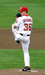 Levale Speigner